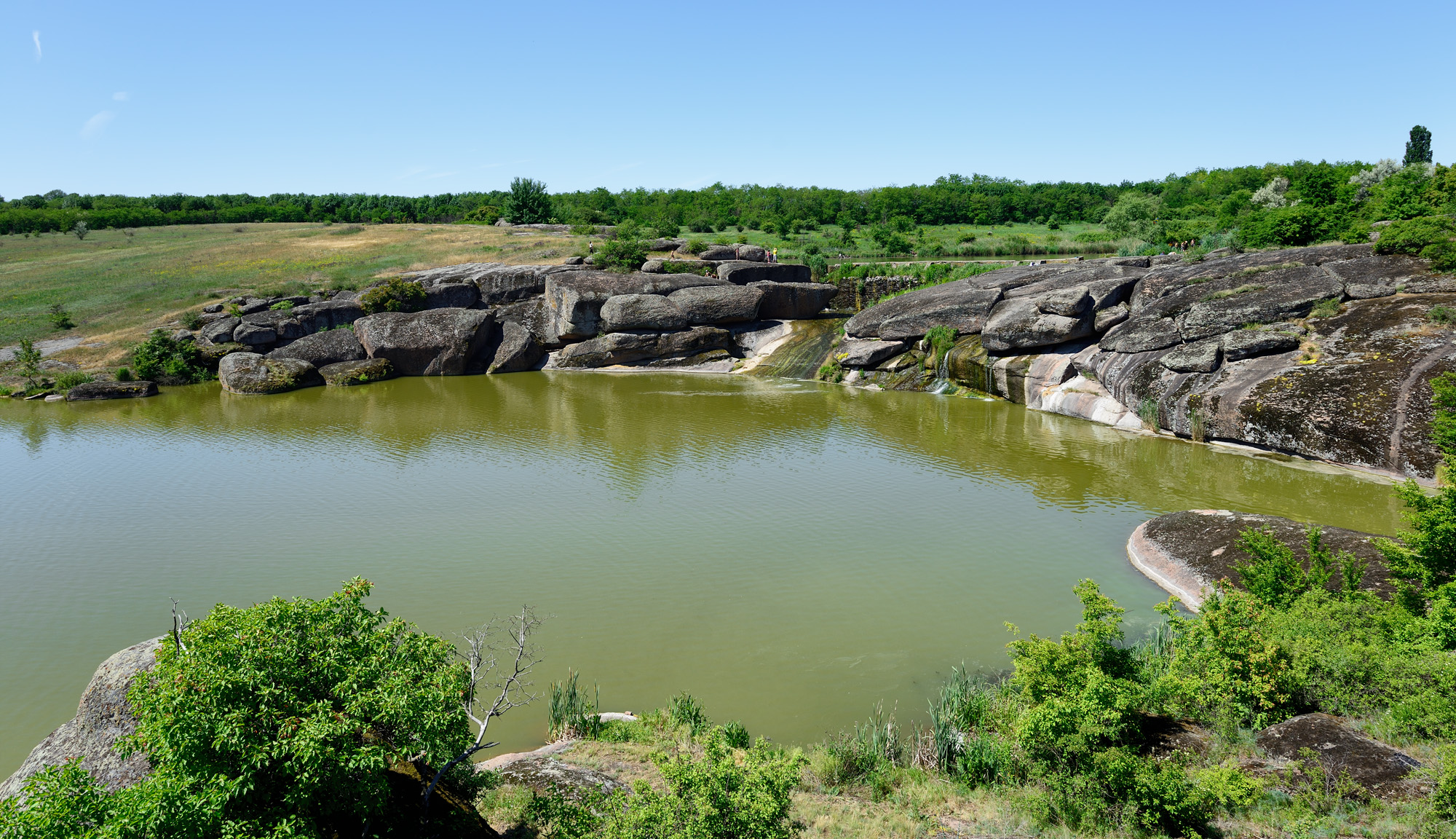 «Каскади», Маловисківський р-н, с. Злинка